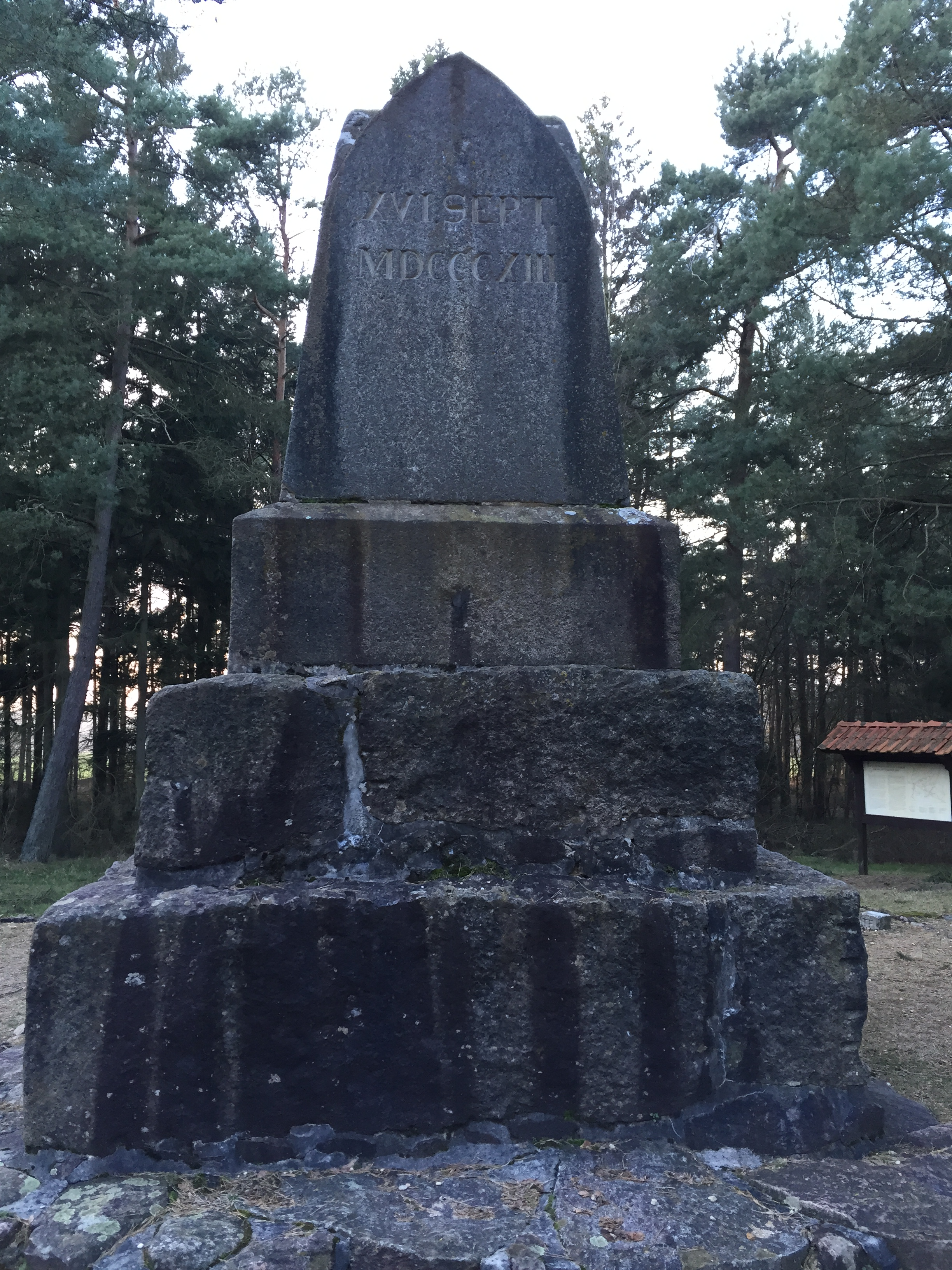 Ostseite des Göhrdeschlachtdenkmals